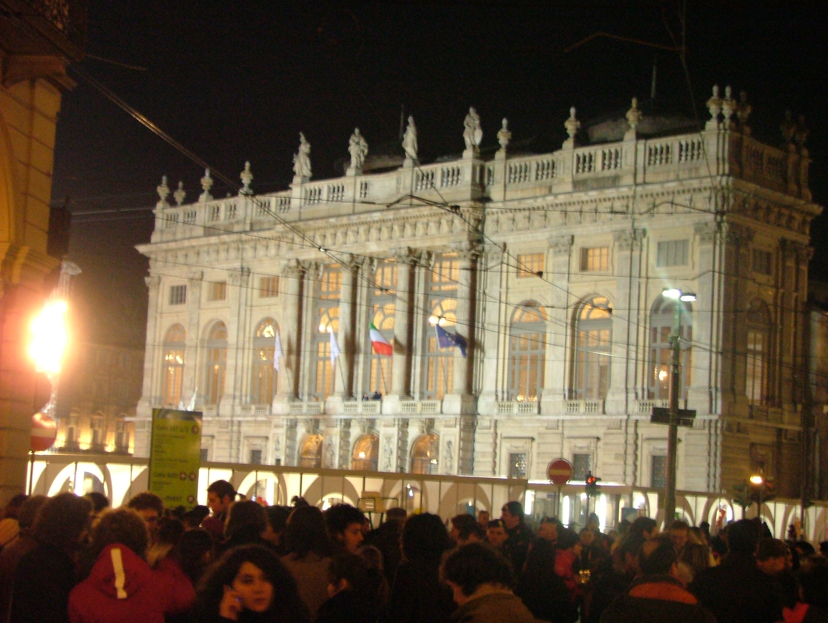 Torino, Italia